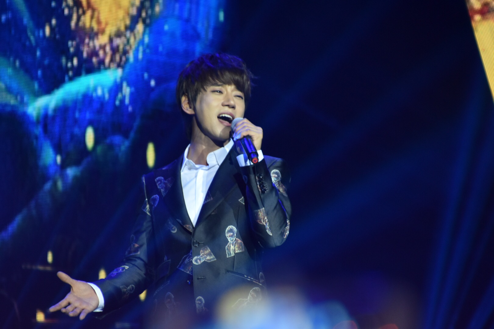 2016.06.23深圳見面會